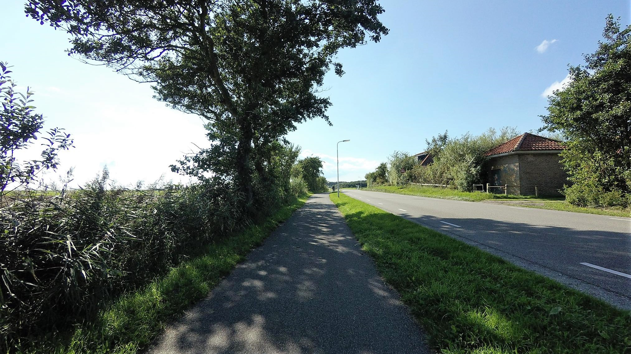 Hee, Hoofdweg, Terschelling